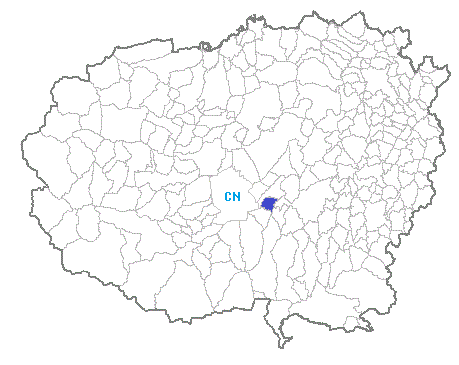 Posizione del comune nella provincia di Cuneo